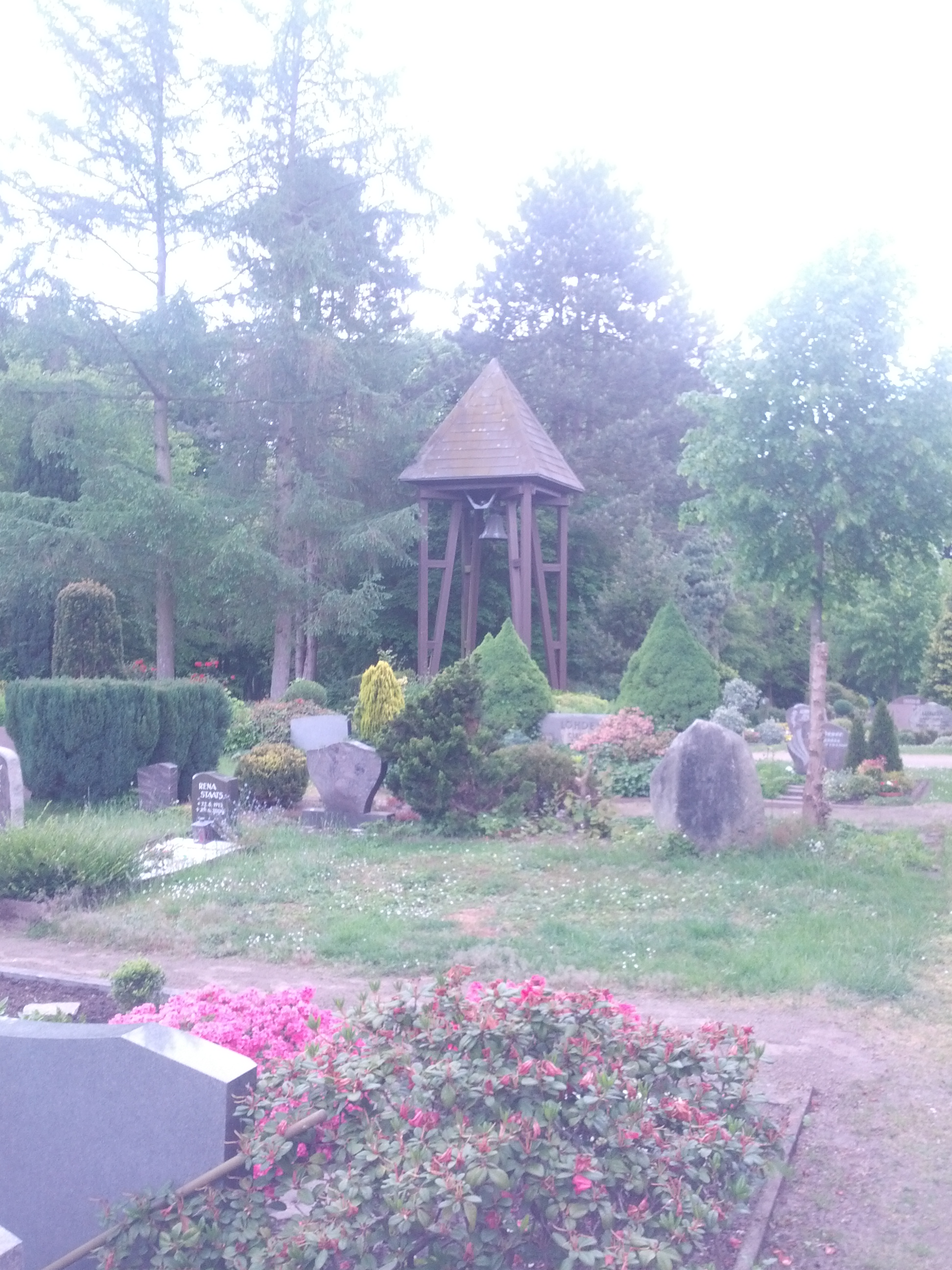 Klockentoorn op’n Karkhoff von Hornborg (Waldkarkhoff)